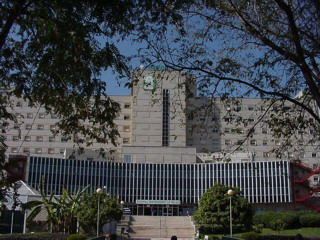 Hospital Universitario Nuestra Señora de Valme. Sevilla. Andalucía, España. Servicio Andaluz de Salud""